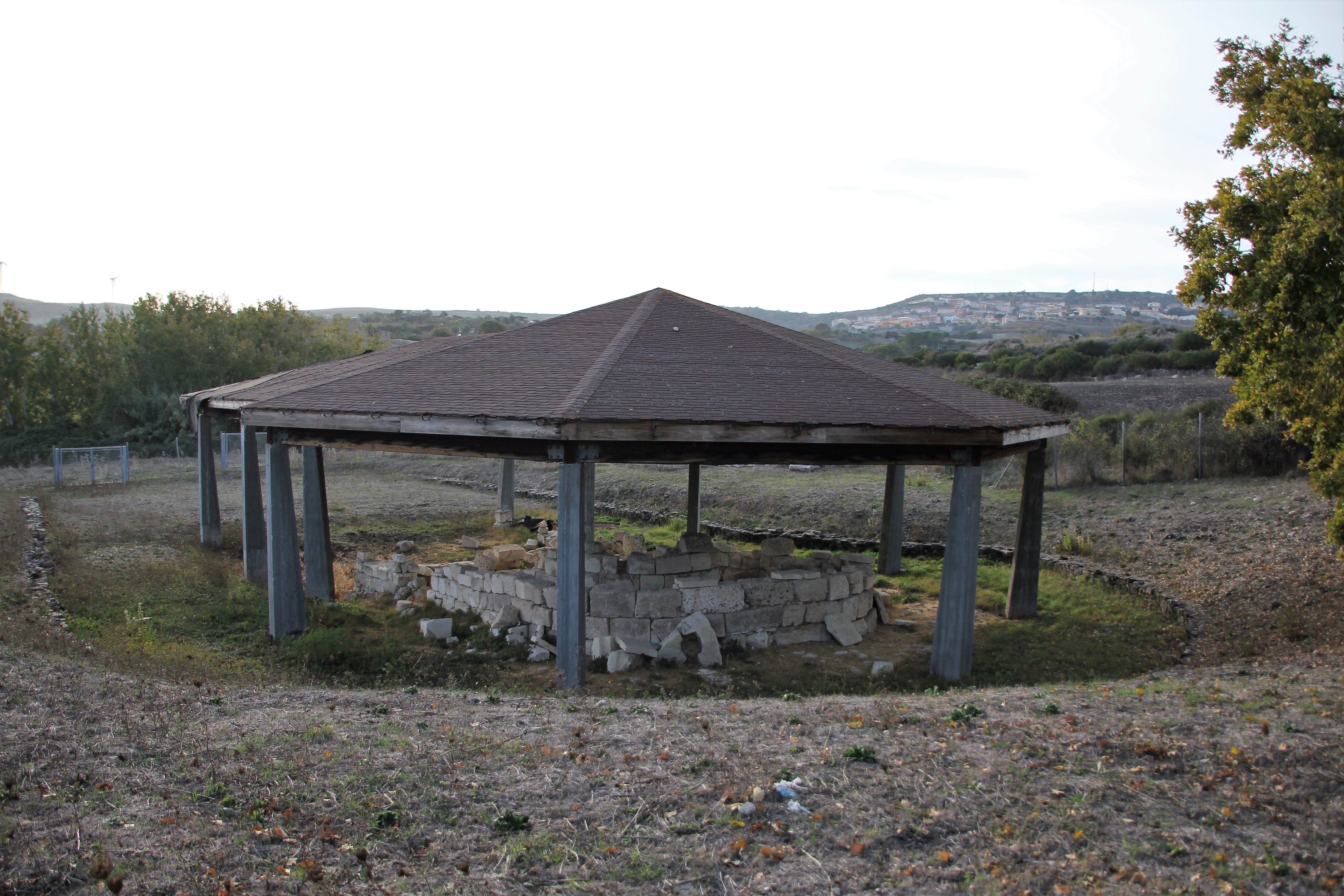 Nulvi, pozzo sacro di nuraghe Irrù